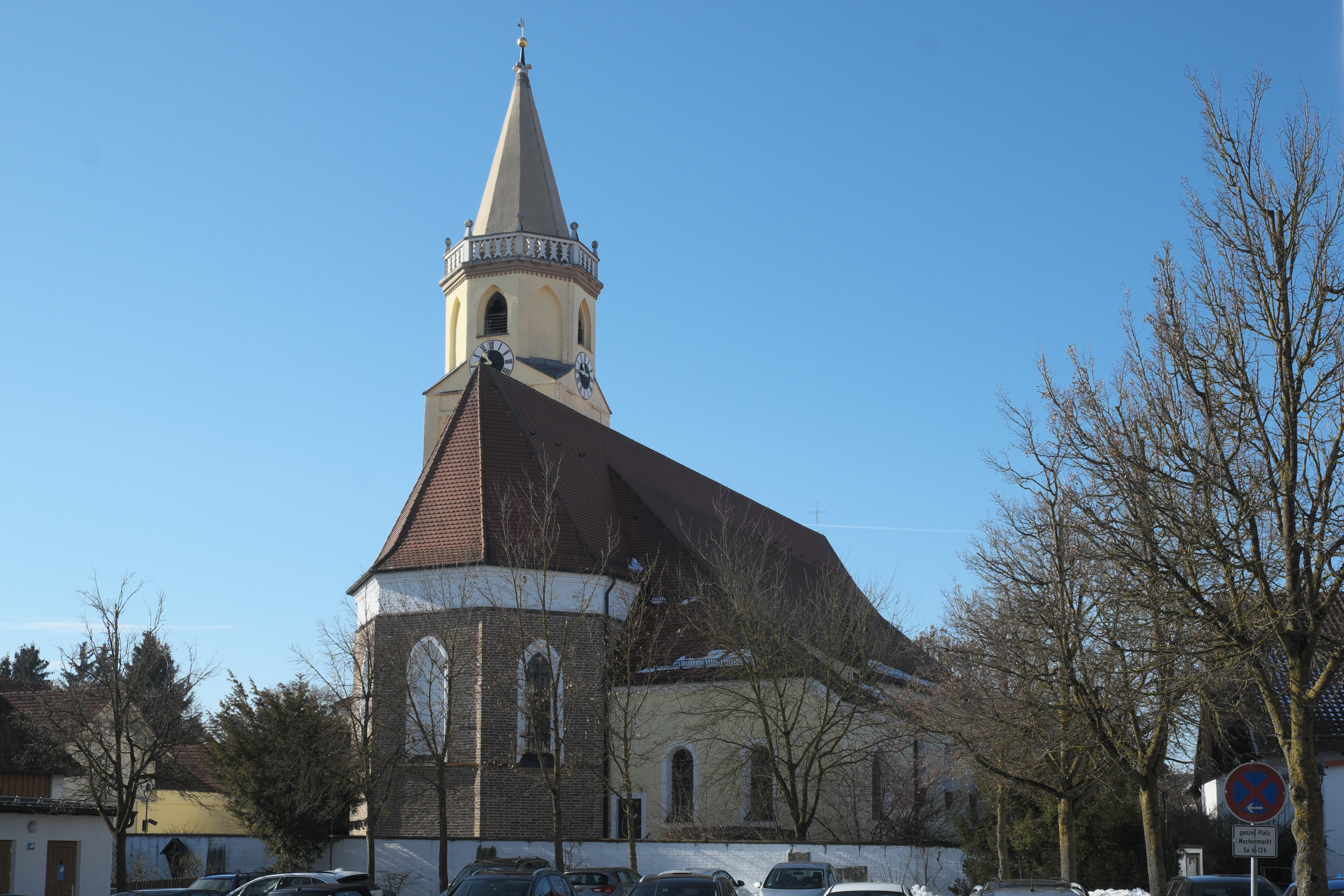 Katholische Pfarrkirche Mariä Himmelfahrt in Essenbach im Landkreis Landshut (Bayern/Deutschland)